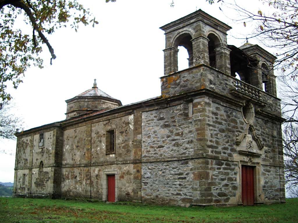 Capilla de Guadalupe en San Vitorio de Ribas de Mino en O Savinao (Lugo, Espana). Picture taken by me in November 2006.